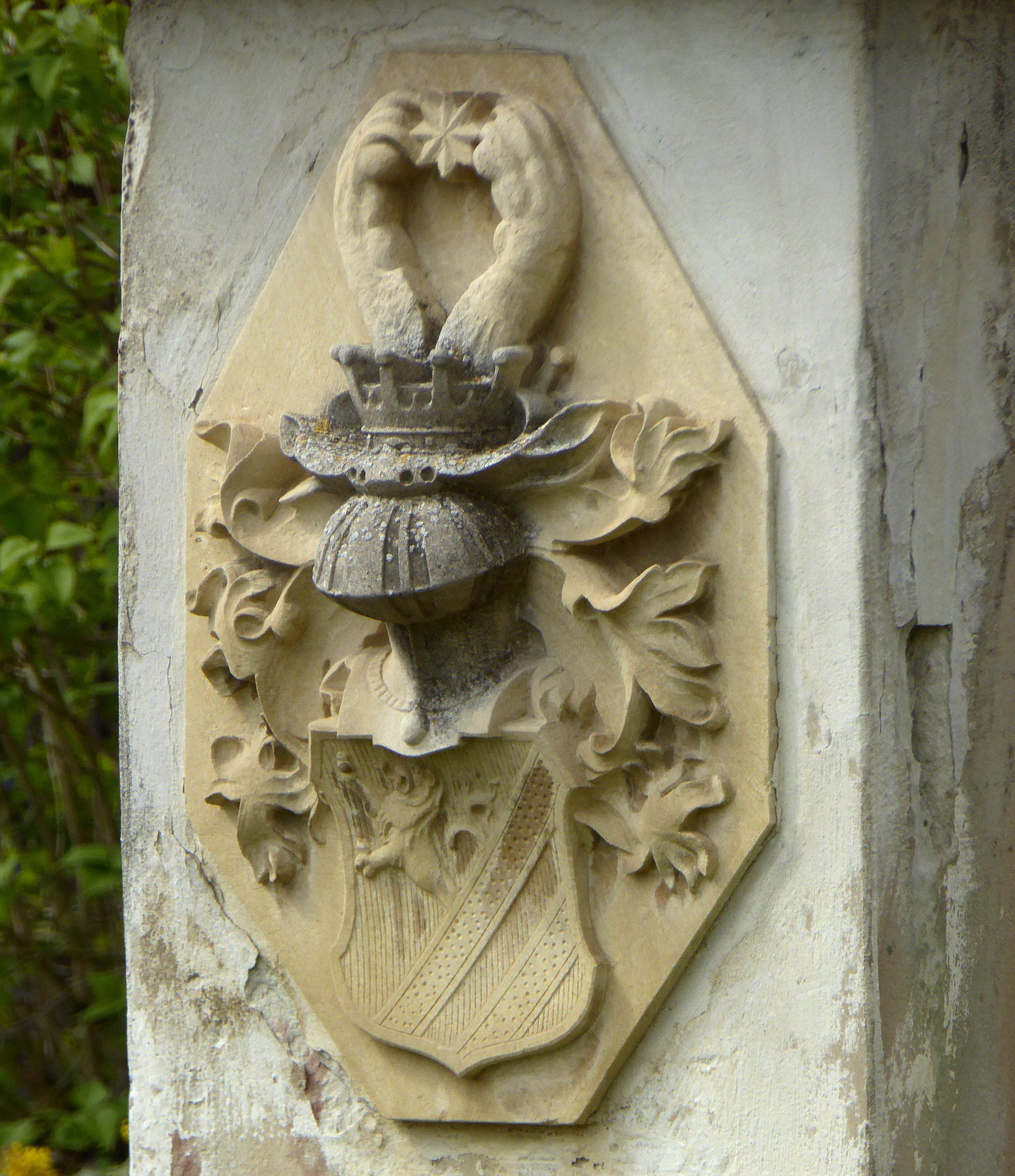 Wappen der Familie Götz von Olenhusen als Relief am Torpfosten der Einfahrt zum Gutshof Olenhusen, Gemeinde Rosdorf, Südniedersachsen